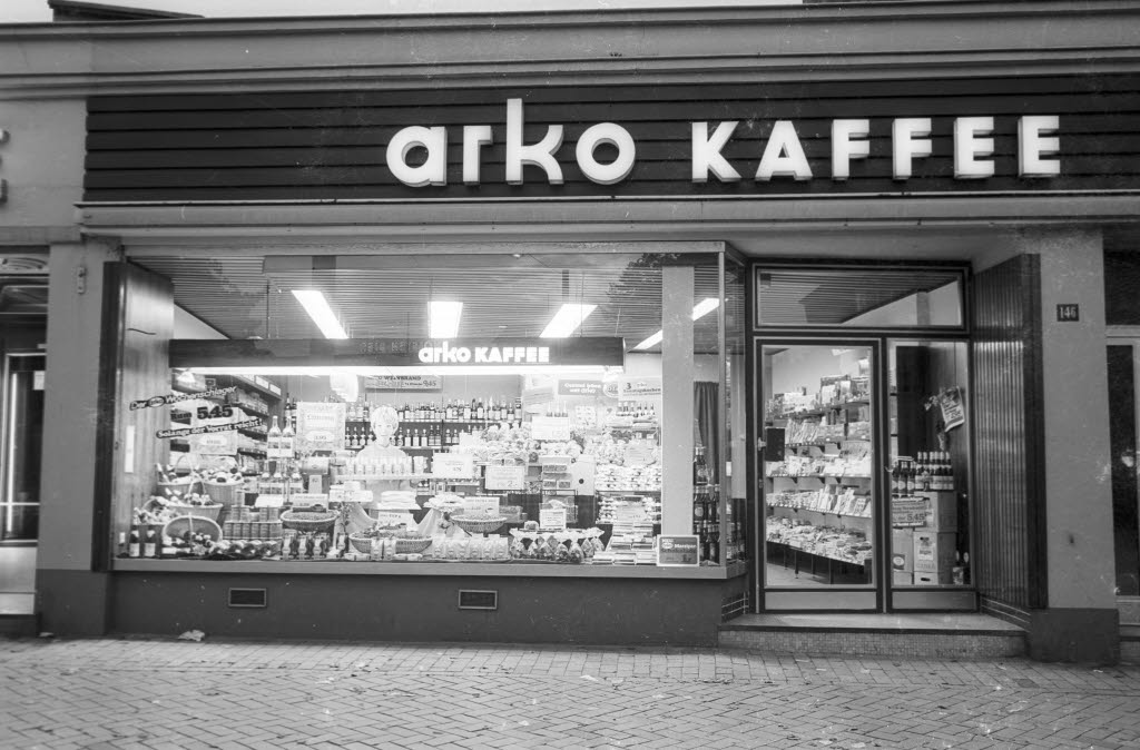 Arko-Geschäft in der Holtenauer Straße 146